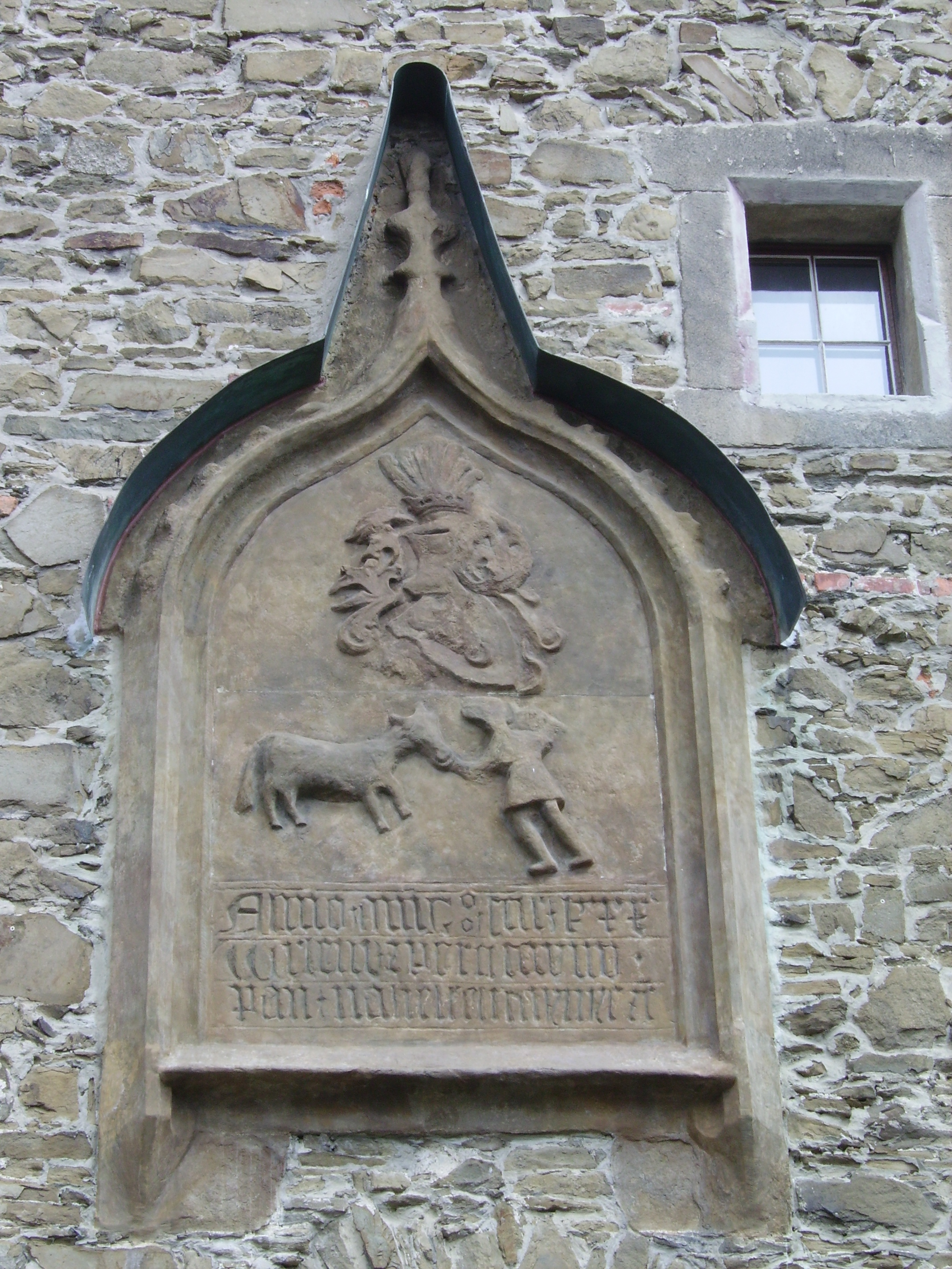 Helfst02.JPG